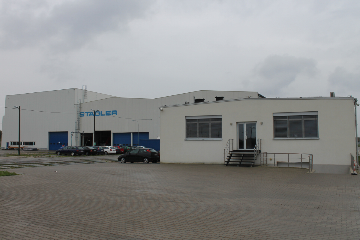 Zakład Stadler Polska w Siedlcach. This photo was taken during Railway Wikiexpedition 2014 set up by Wikimedia Polska Association in cooperation with Fundacja Grupy PKP. You can see all photographs in category Wikiekspedycja kolejowa 2014.